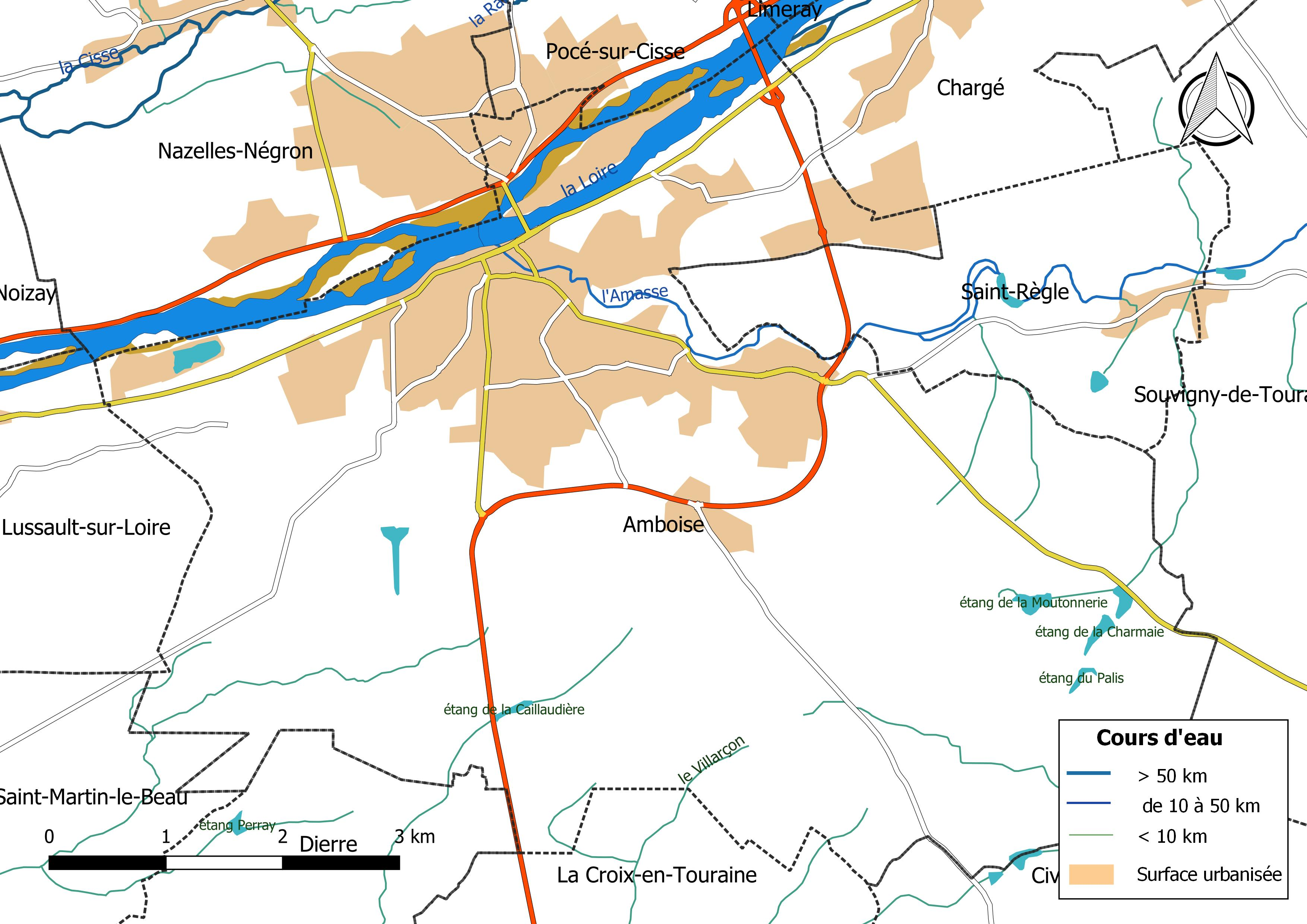 Carte du réseau hydrographique de la commune de Amboise (France).